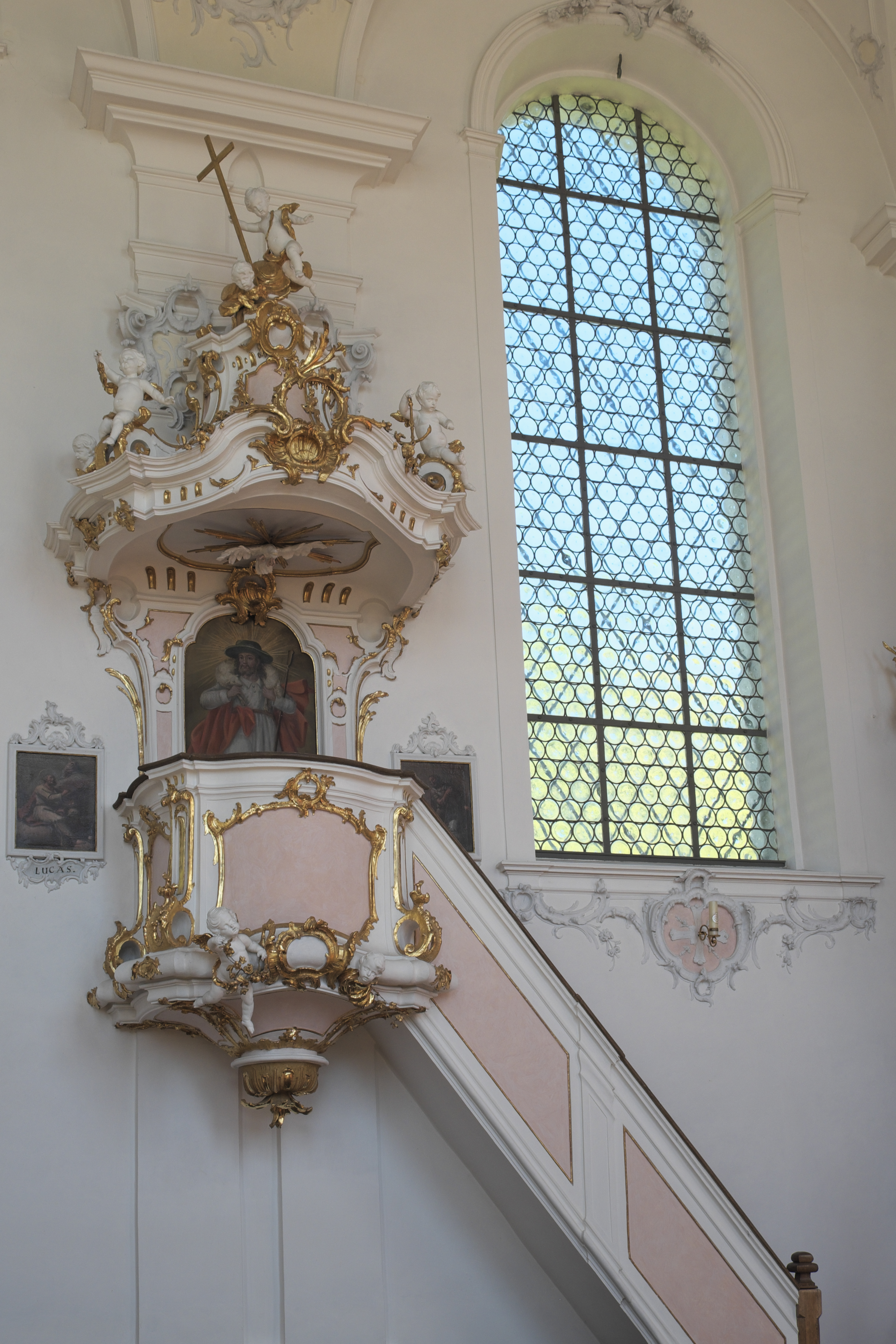 Katholische Pfarrkirche St. Johannes Baptist in Wessobrunn im Landkreis Weilheim-Schongau (Bayern/Deutschland), Rokoko-Kanzel von Tassilo Zöpf